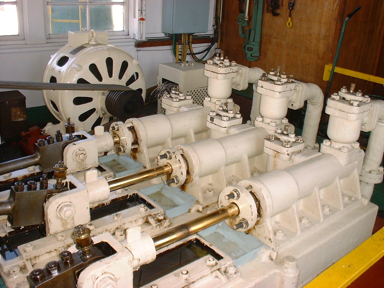 三池港の閘門を動かす水流ポンプです。電動モーターで駆動します。100年以上を経て現役として稼働する設備として大変貴重なものです。